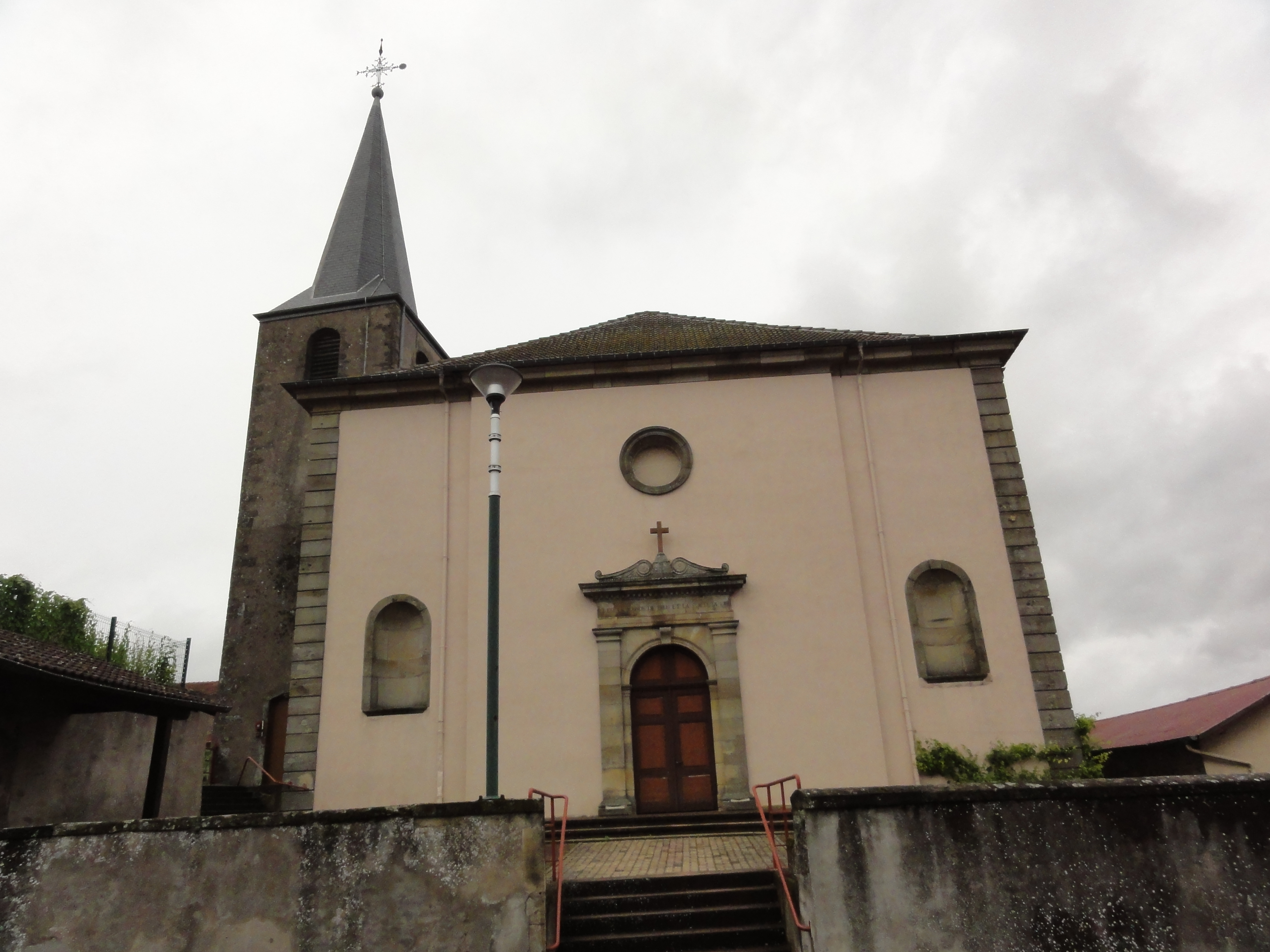 Glonville (M-et-M) église